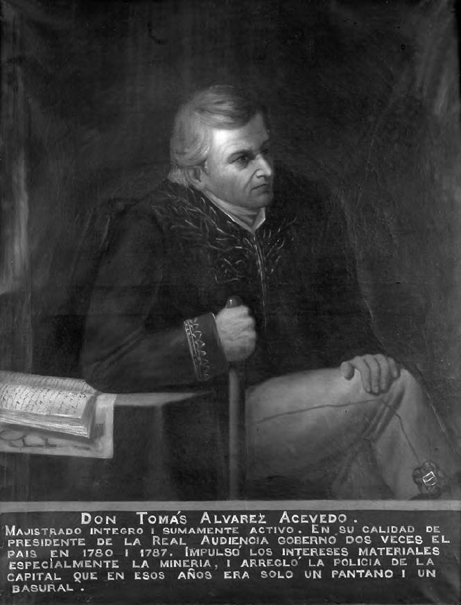 Retrato de Tomás Álvarez de Acevedo Ordaz, Gobernador del Reino de Chile entre 1780 y 1787-1788. La Colecciòn de Retratos de los Presidentes del Coloniaje. The collection of Portraits of the Governors of Chile is in the Museo Histórico Nacional (Chile) and was commissioned by Benjamín Vicuña Mackenna for the 1873 Colonial Exhibition and painted by various artists. It replaces a series of portraits of Chile's colonial governors dating from the colonial era which was destroyed during the wars for independence. [1].